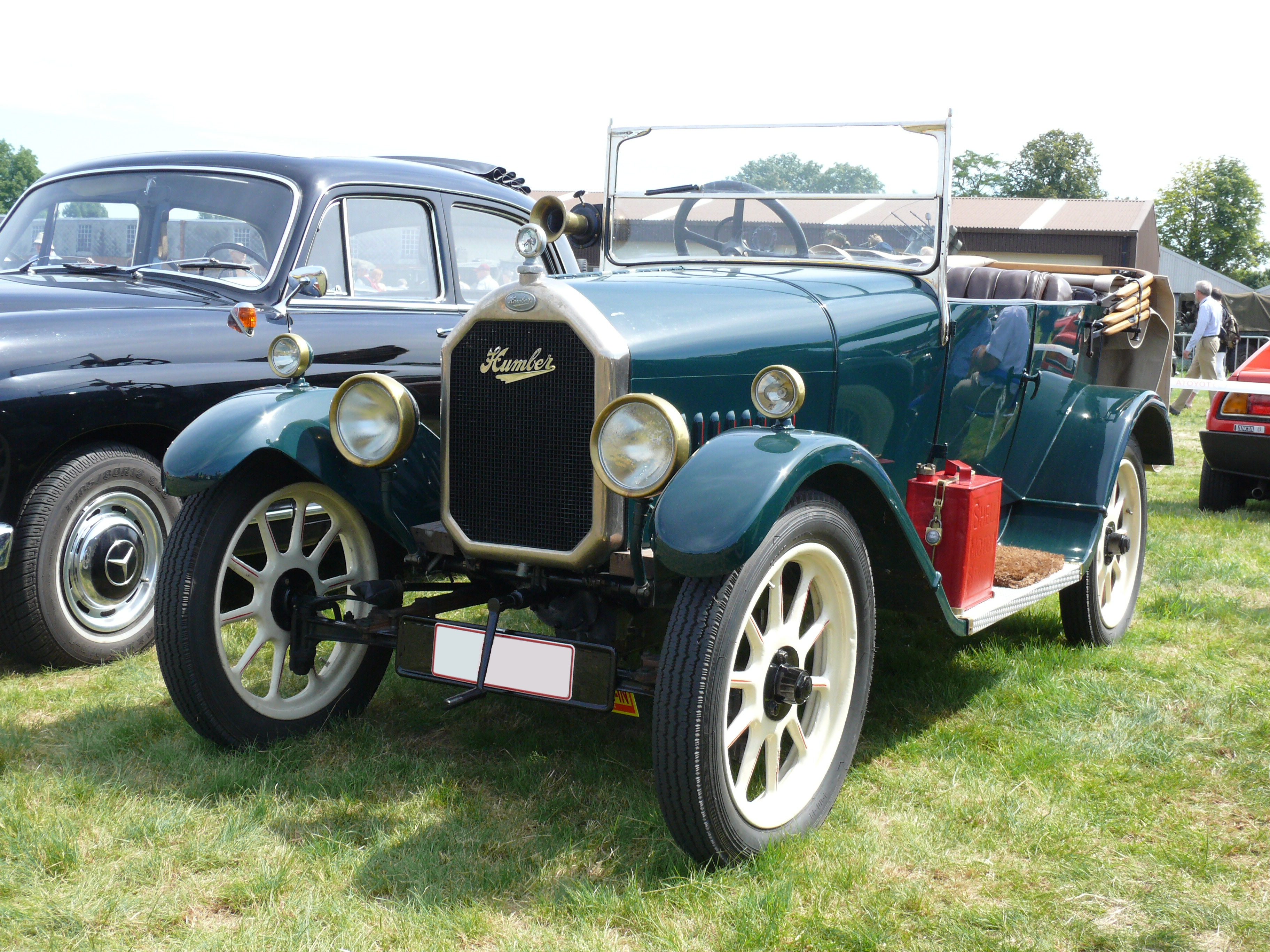 Humber 9/20 op de Schaffen Fly and Drive In 2012.